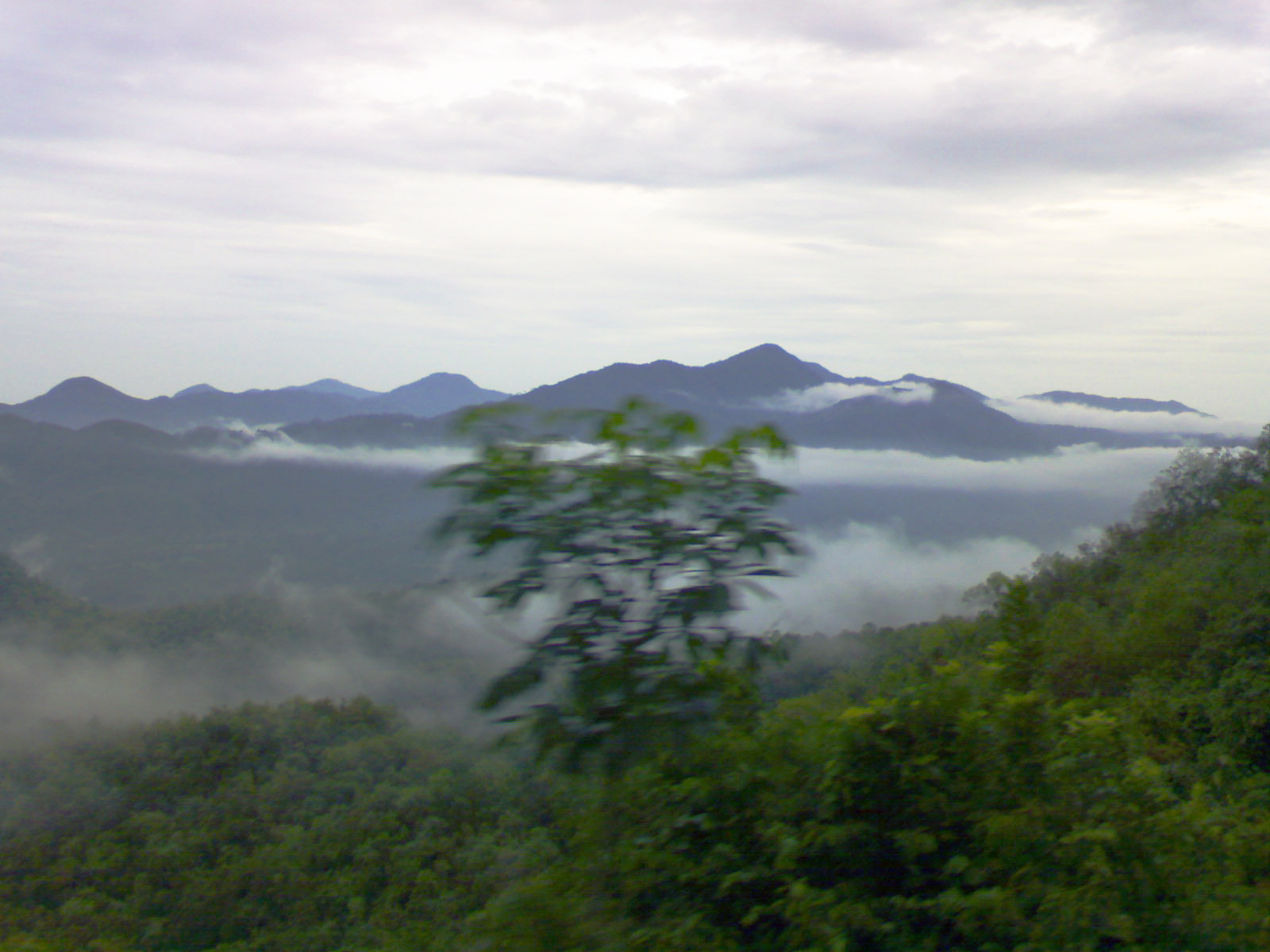 Deomali by Santanu Mahapatra, Koraput